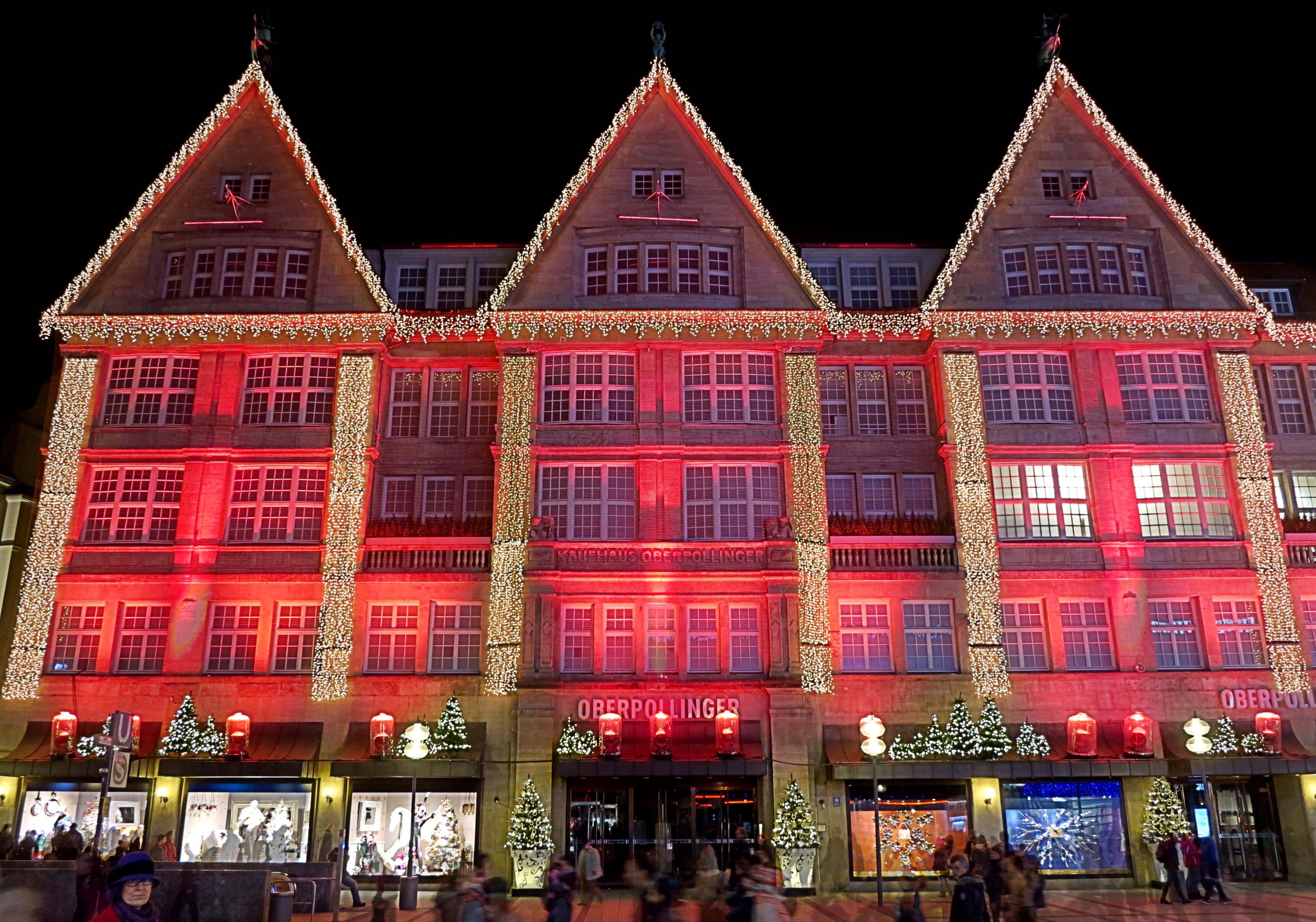 Deutschland, Bayern, Oberbayern, München, Fußgängerzone, Neuhauser Straße, Kaufhaus Oberpollinger im "Weihnachtsschmuck"